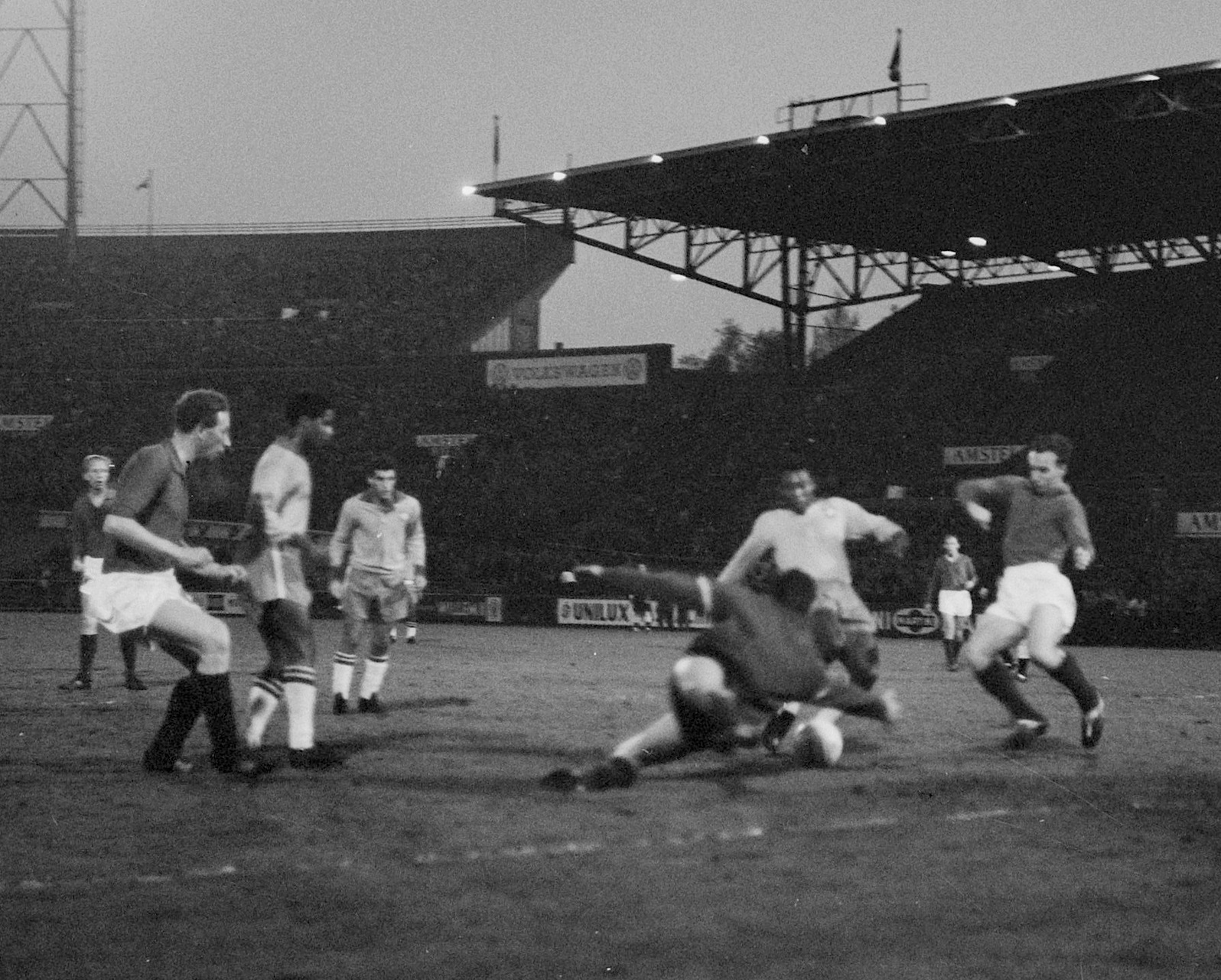 Nederland tegen Brazilie 1-0. P. Graafland in duel met Pele v.l.n.r. Klaassens, Markos, Nij en Haak